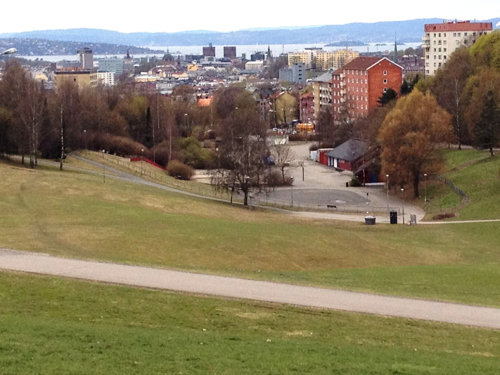 Torshovdalen, Oslo